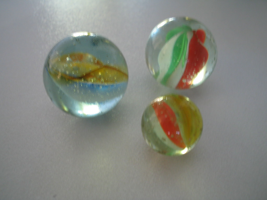 Knikkers